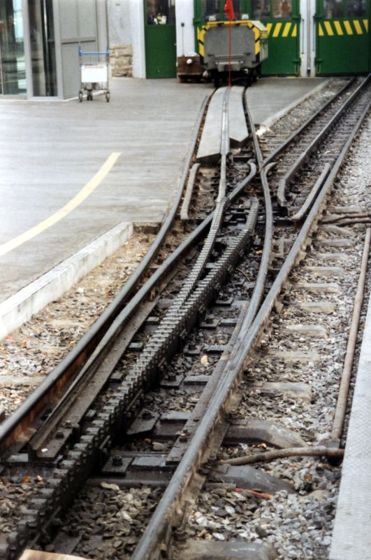 Wengernalpbahn Zahnradbahnweiche Lauterbrunnen.